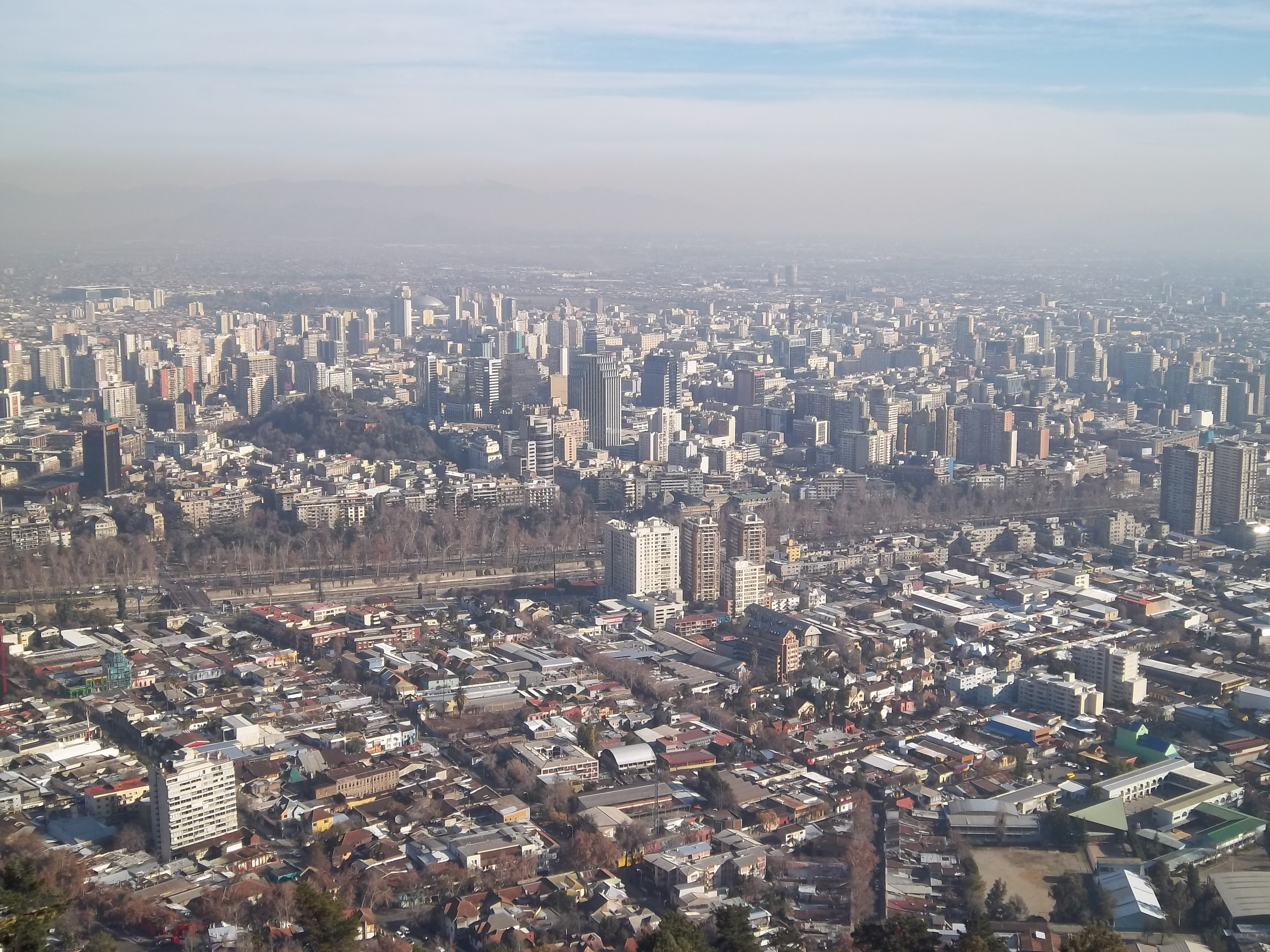 Río Mapocho (en el centro) y Cerro Santa Lucía (arriba a la izquierda) desde el Cerro San Cristóbal.